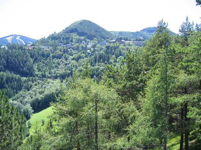 Semmeringblick